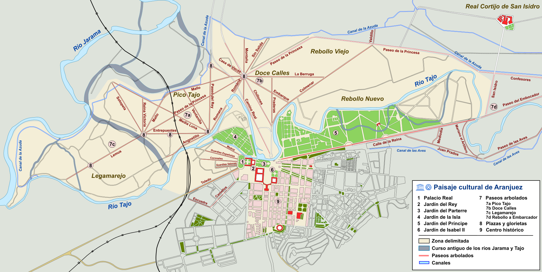 Mapa sobre el paisaje cultural de Aranjuez